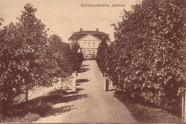 Norrvikens villastad sollentuna vykort